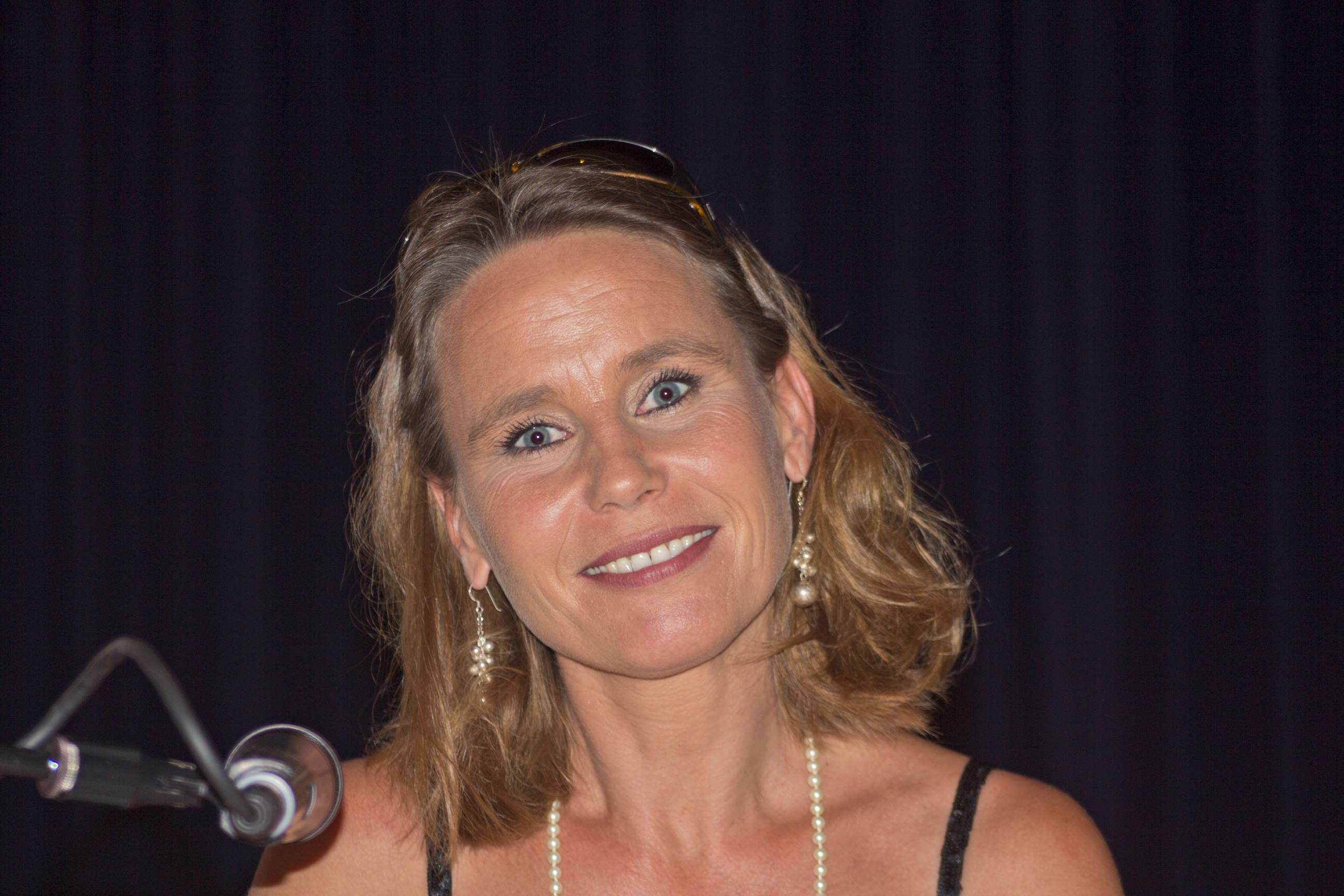 Marie Theres Kroetz-Relin (* 30. Juni 1966 in München), österreichisch-Schweizer Schauspielerin, Autorin und Journalistin. Kroetz-Relin ist die Tochter der Schauspielerin Maria Schell und des Filmregisseurs Veit Relin